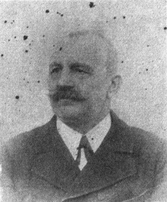 Österreichischer Politiker, Reichsratswahl 1907, Name siehe Dateiname